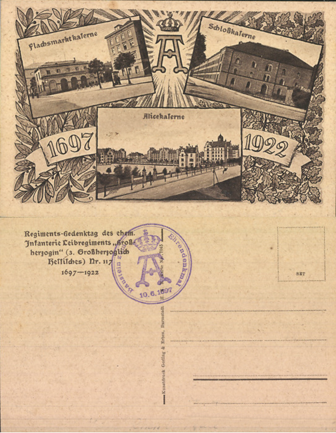 Infanterie-Leib-Regiment „Großherzogin“ (3. Großherzoglich Hessisches) Nr. 117, aufgelöst 1919. - Ensemble früherer Standortaufnahmen, 225 Jahres-Jubiläumskarte